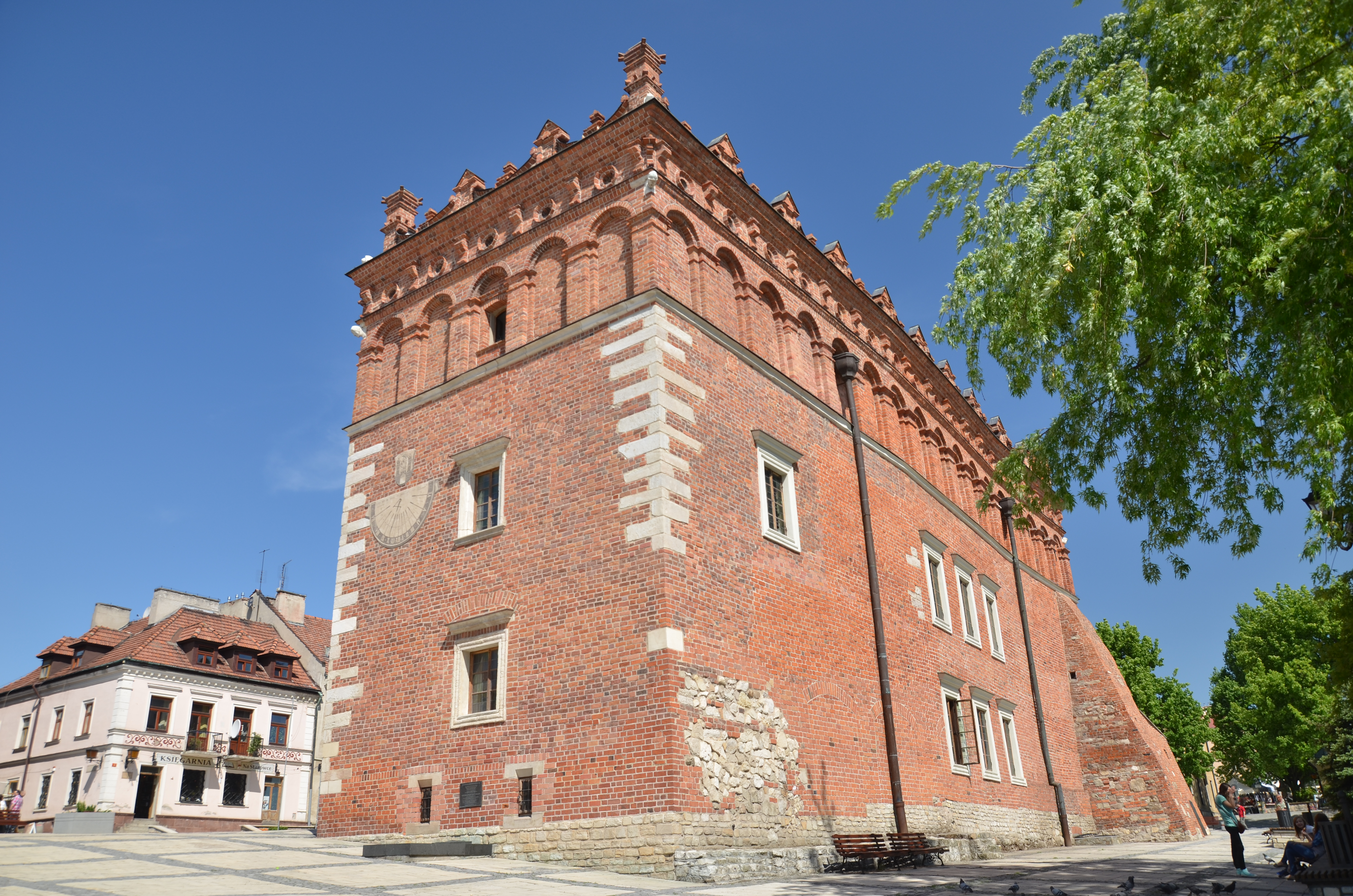 Sandomierz, Rynek - ratusz, poł. XIV, XVI, XVII